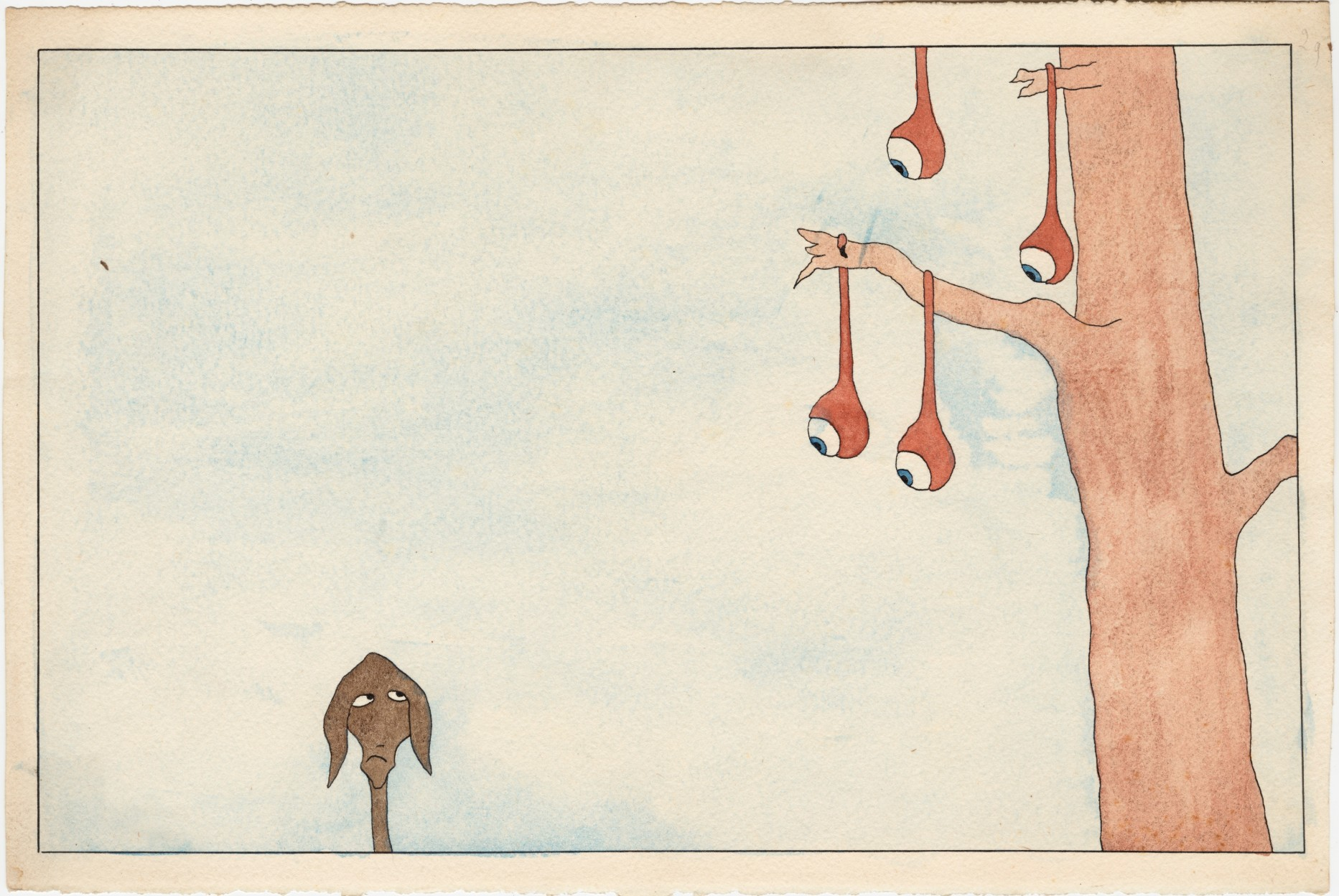 Léopold Chauveau (1870-1940) Paysage monstrueux, n°29, 1939 Encre noire et aquarelle - 19,5 x 28,5 cm Collection particulière Photo : Musée d’Orsay-RMN-GP/Patrice Schmidt